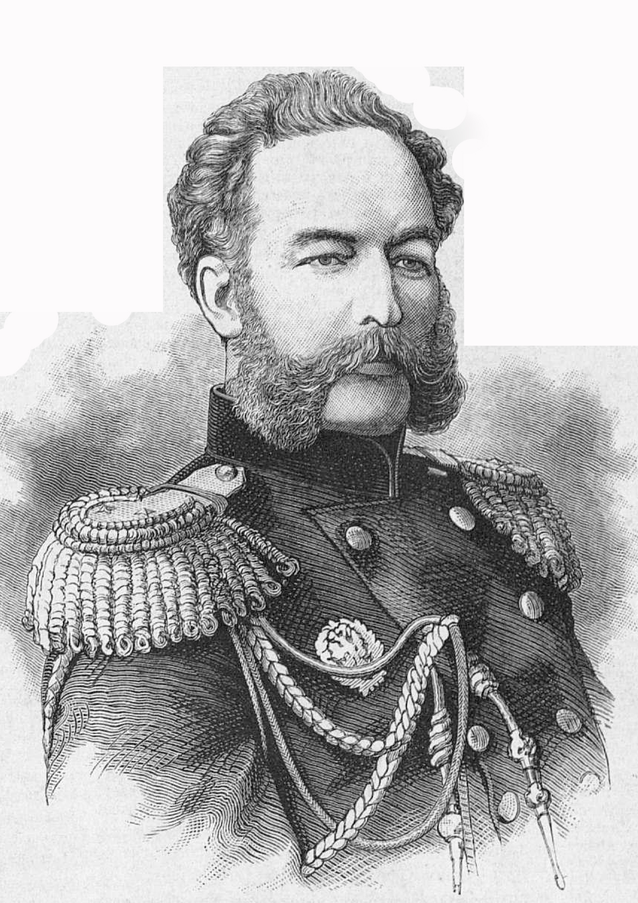 Генерал Дандевиль Виктор Дезидерьевич, 1877